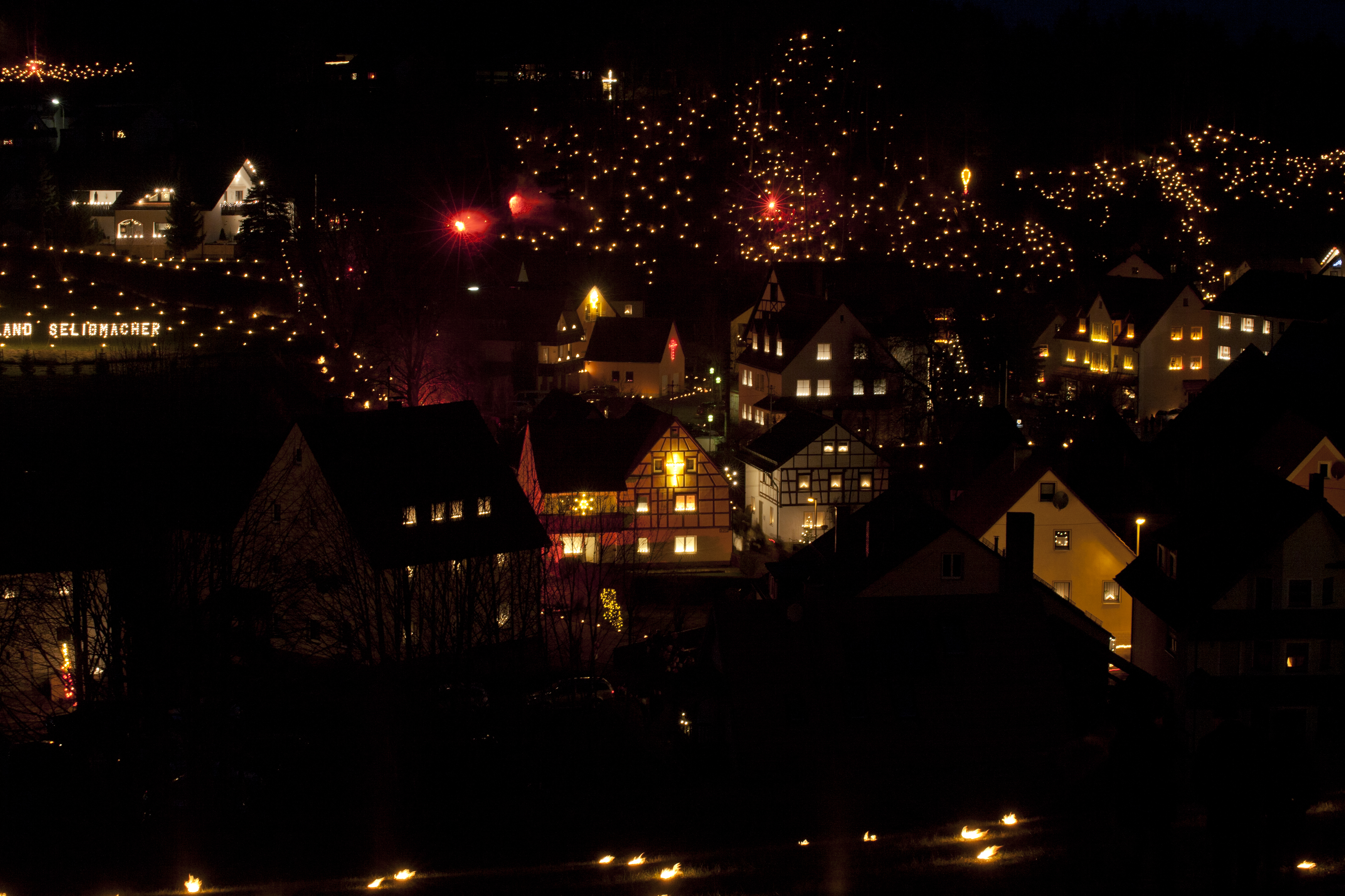 Jährlich am 3. Januar feiert die Kirchengemeinde Obertrubach den traditionellen „Beschluss der Ewigen Anbetung“, ein kirchliches Fest mit feierlicher Schlussprozession und tausenden Lichtern an den Berg- und Felsenhängen.